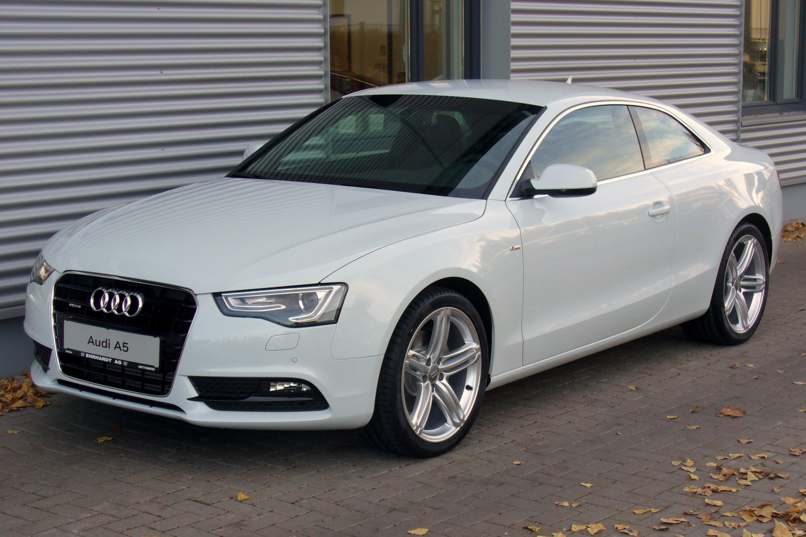 Audi A5 Coupé Facelift